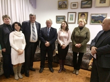 Творчі настанови та поради від поетів-письменників